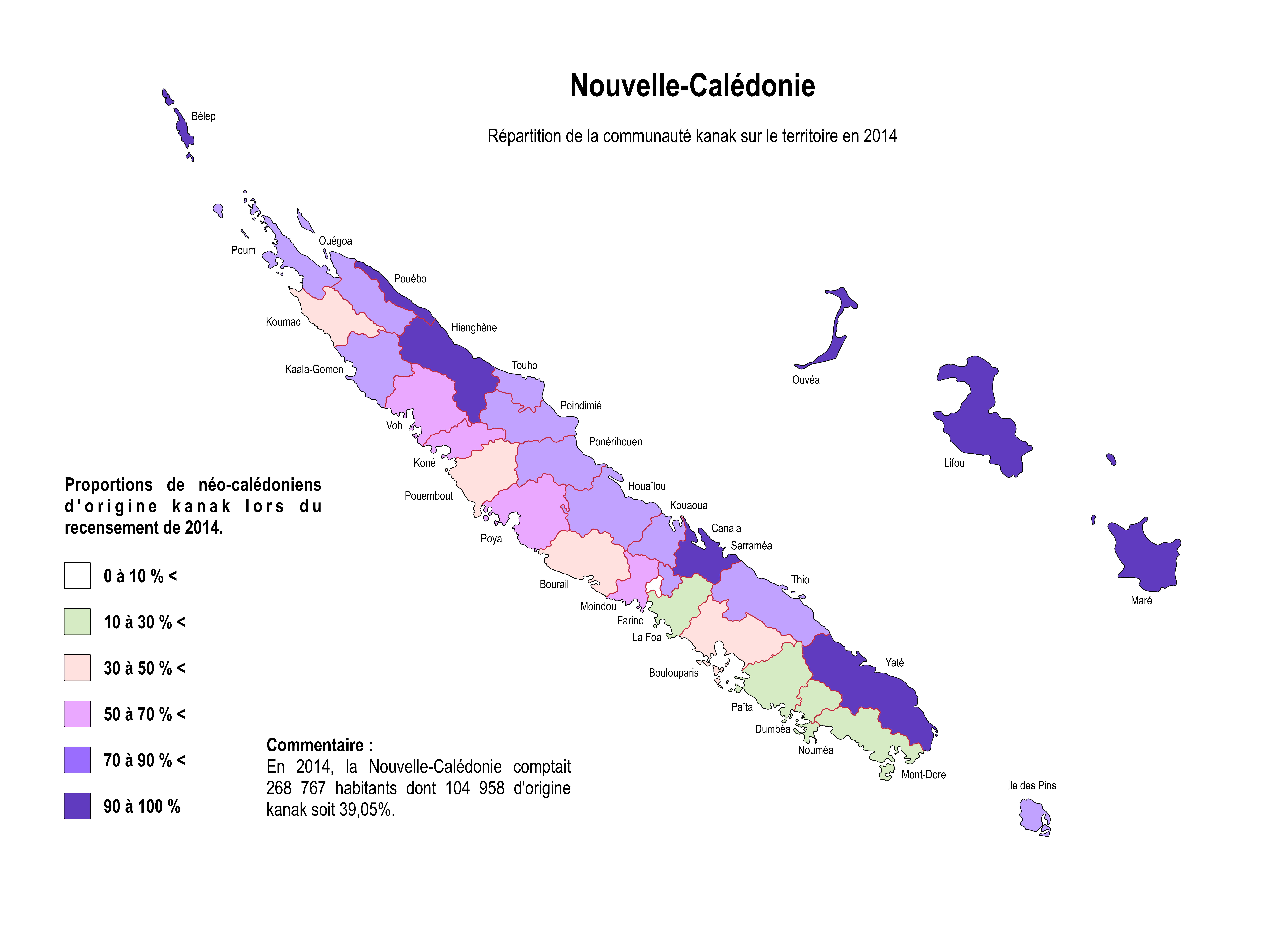 Répartition de la communauté kanak sur le territoire néo-calédonien tel qu'issue des données du recensement de 2014.